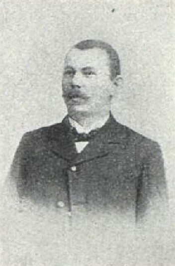 Václav Kropáček (1864-1934), rakouský a český politik